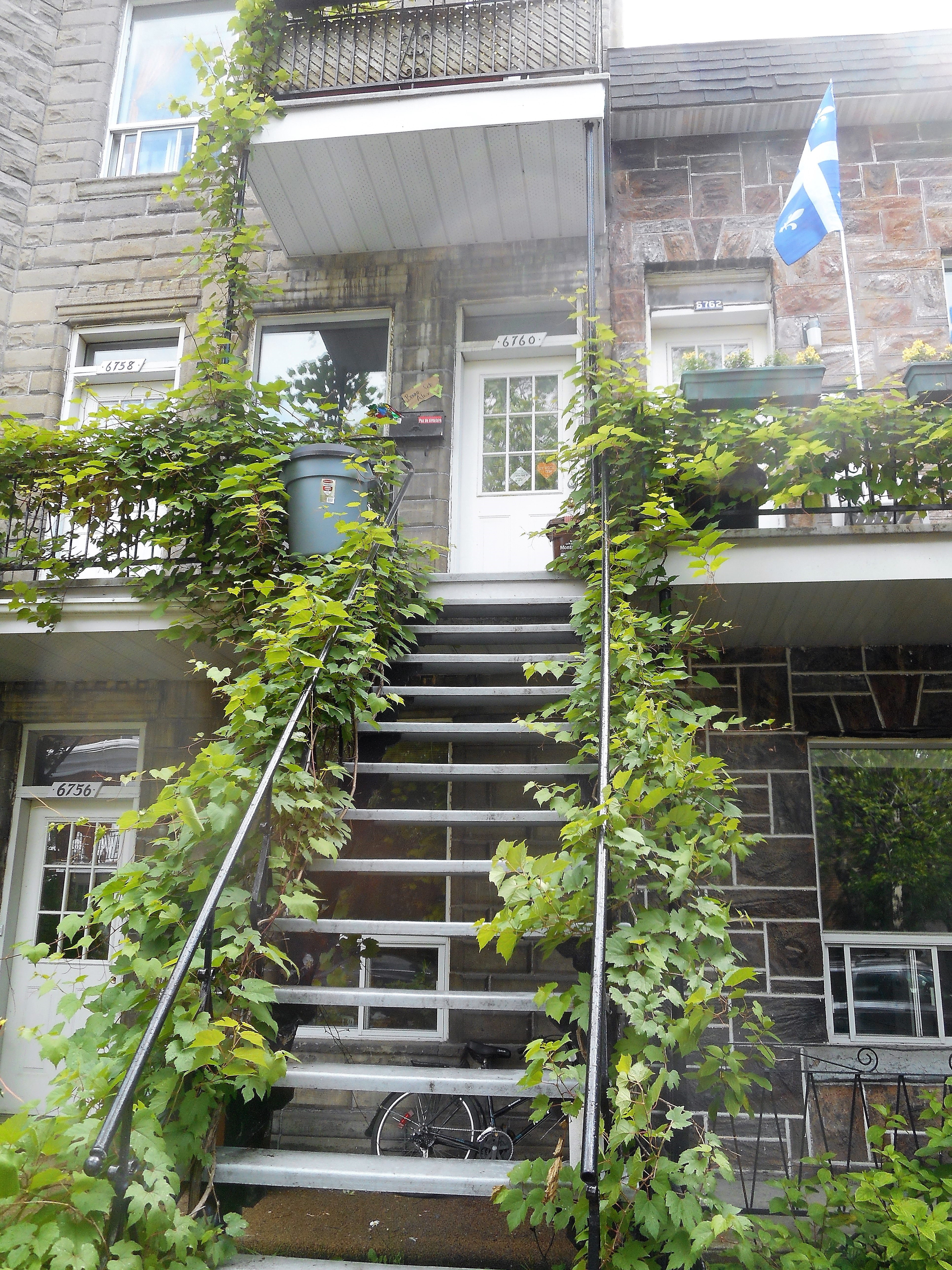 Façade du « 6760 Saint-Vallier, Montréal », où a résidé le musicien Robert Léger du groupe Beau Dommage en 1972. Cette adresse est citée dans la chanson Tous les palmiers.